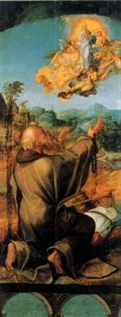 A "Visão de Santo Antão" forma, juntamente com a "Pregação de São João Baptista", "Santo Antão e São Paulo Eremita", "São Jerónimo" e "Santo Antão e o Sátiro", um conjunto designado por "série dos arcos" devido à arcaria que se rasga sobre um fundo azul e que corre a parte inferior de todas as tábuas. O "Retábulo do Mestre dos Arcos", nome pelo qual também é conhecido, não foi ainda objecto de um estudo aprofundado, com excepção da contribuição de Luís Reis-Santos que atribuíu as tábuas a Gregório Lopes, o que, contudo, não deixa de levantar alguns problemas, uma vez que estas pinturas não se enquadram plenamente no estilo do pintor. Este quadro, tal como os restantes quatro painéis que compunham o conjunto da "série dos arcos", provêm do Convento de São Bento da Saúde (Lisboa), embora tudo indique que não seriam originários desta instituição beneditina, construída em 1598, ou seja, numa data posterior à feitura dos painéis.